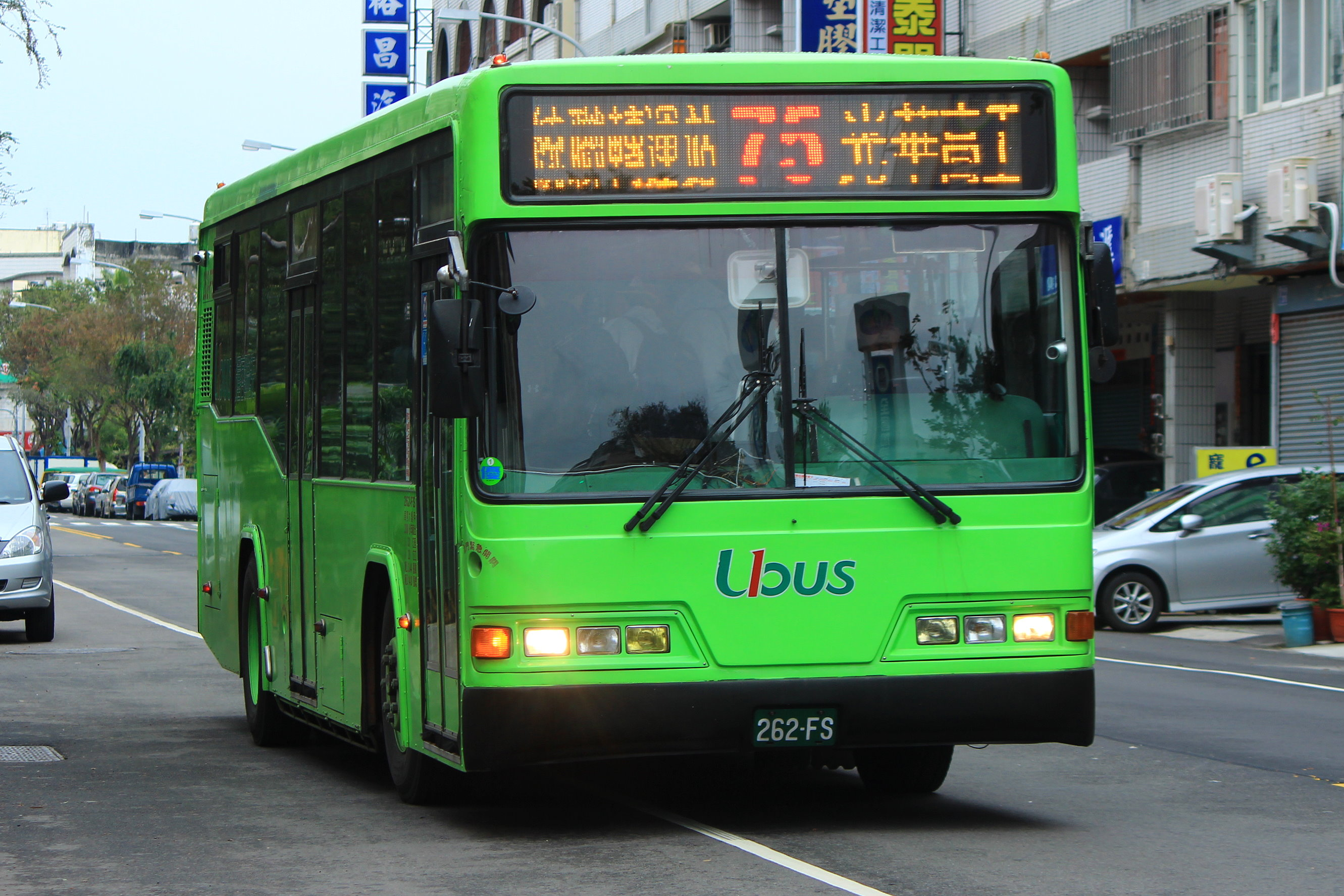 統聯客運2006年日野ERK2JMU大客車262-FS。